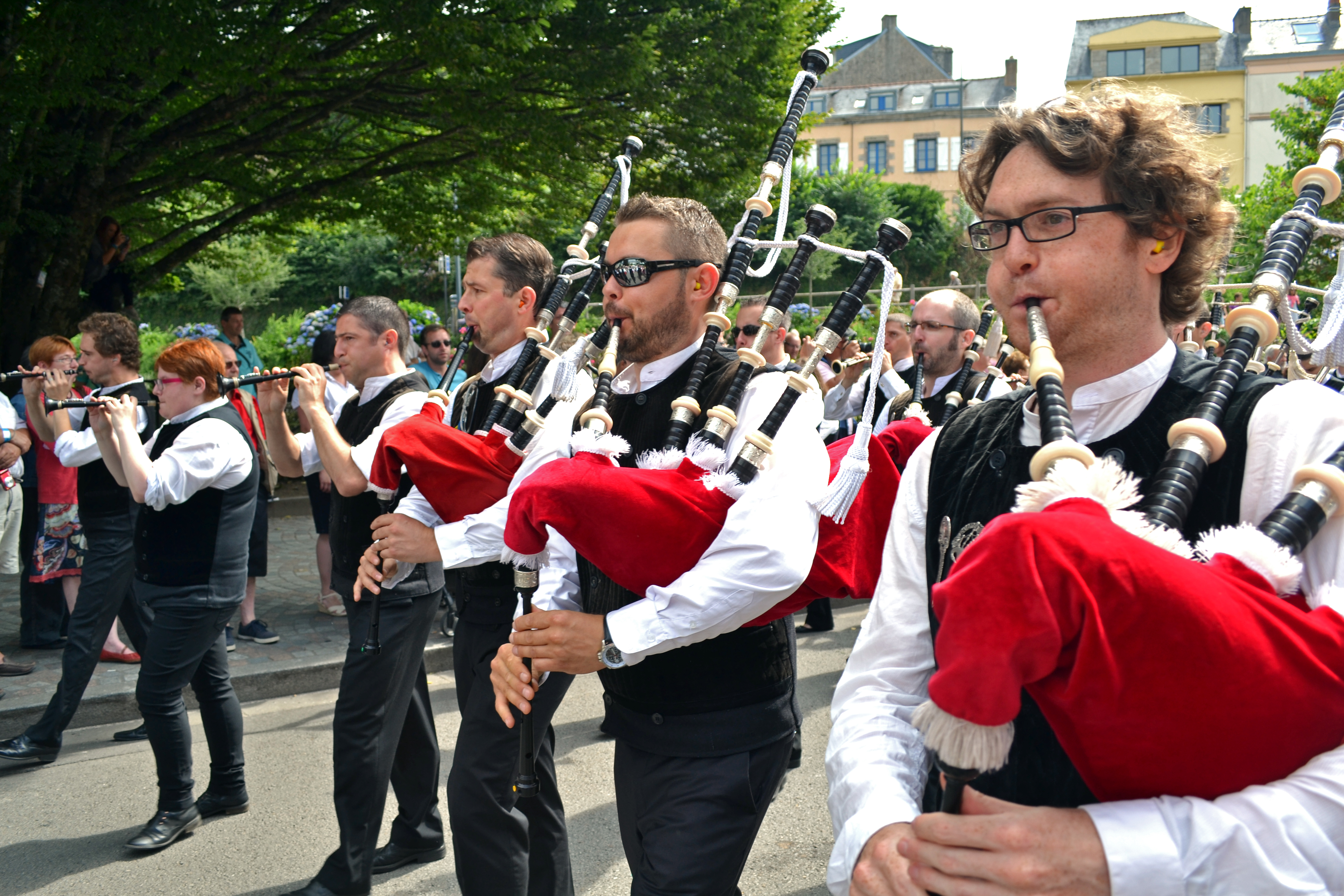 Défilé Bagad Cap Caval (Pont l'Abbé) lors du festival de Cornouaille 2014 le dimanche 27 juillet pour Kemper en Fête dans les rues de Quimper.